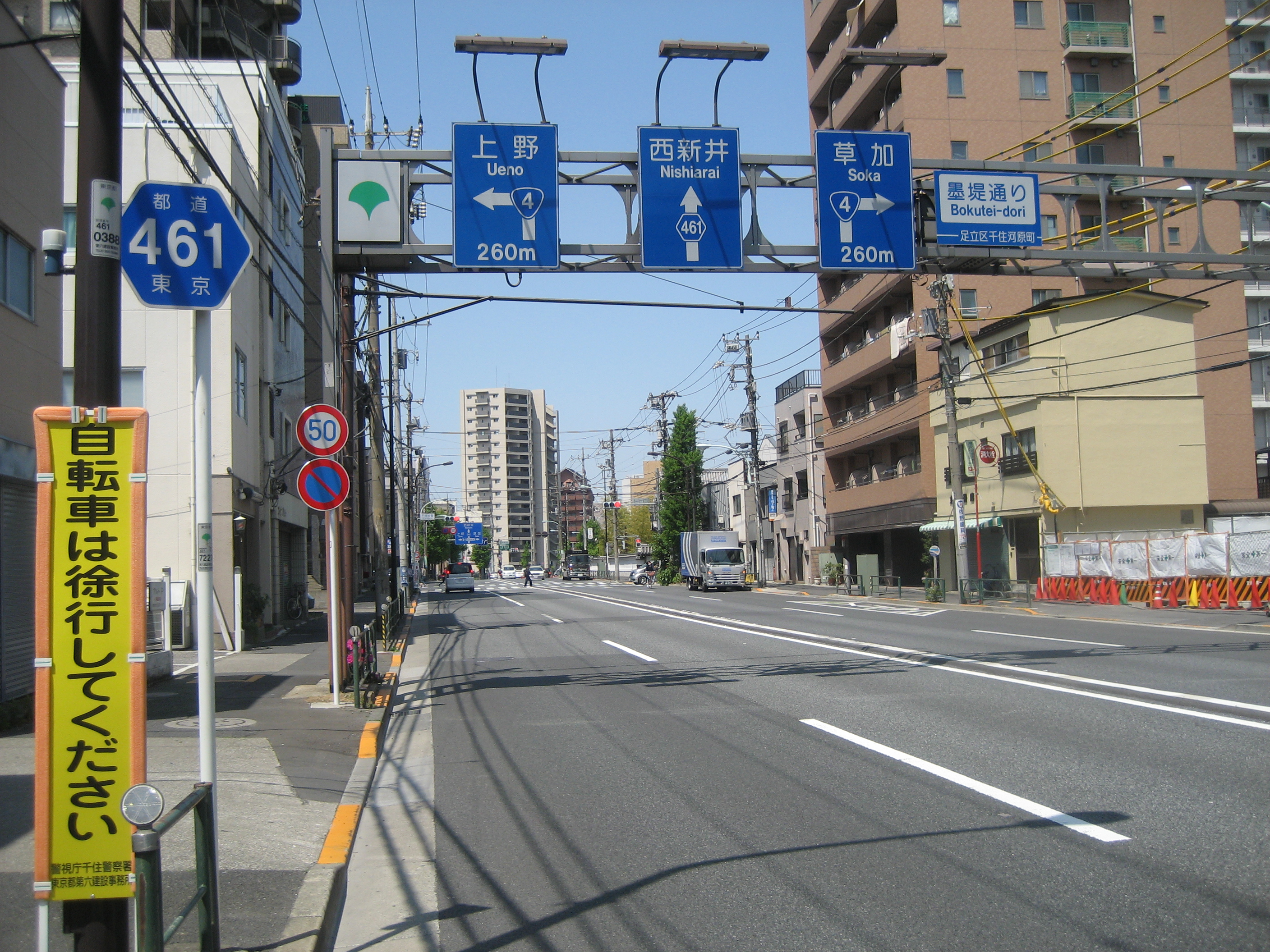 東京都道461号線足立区千住河原町付近